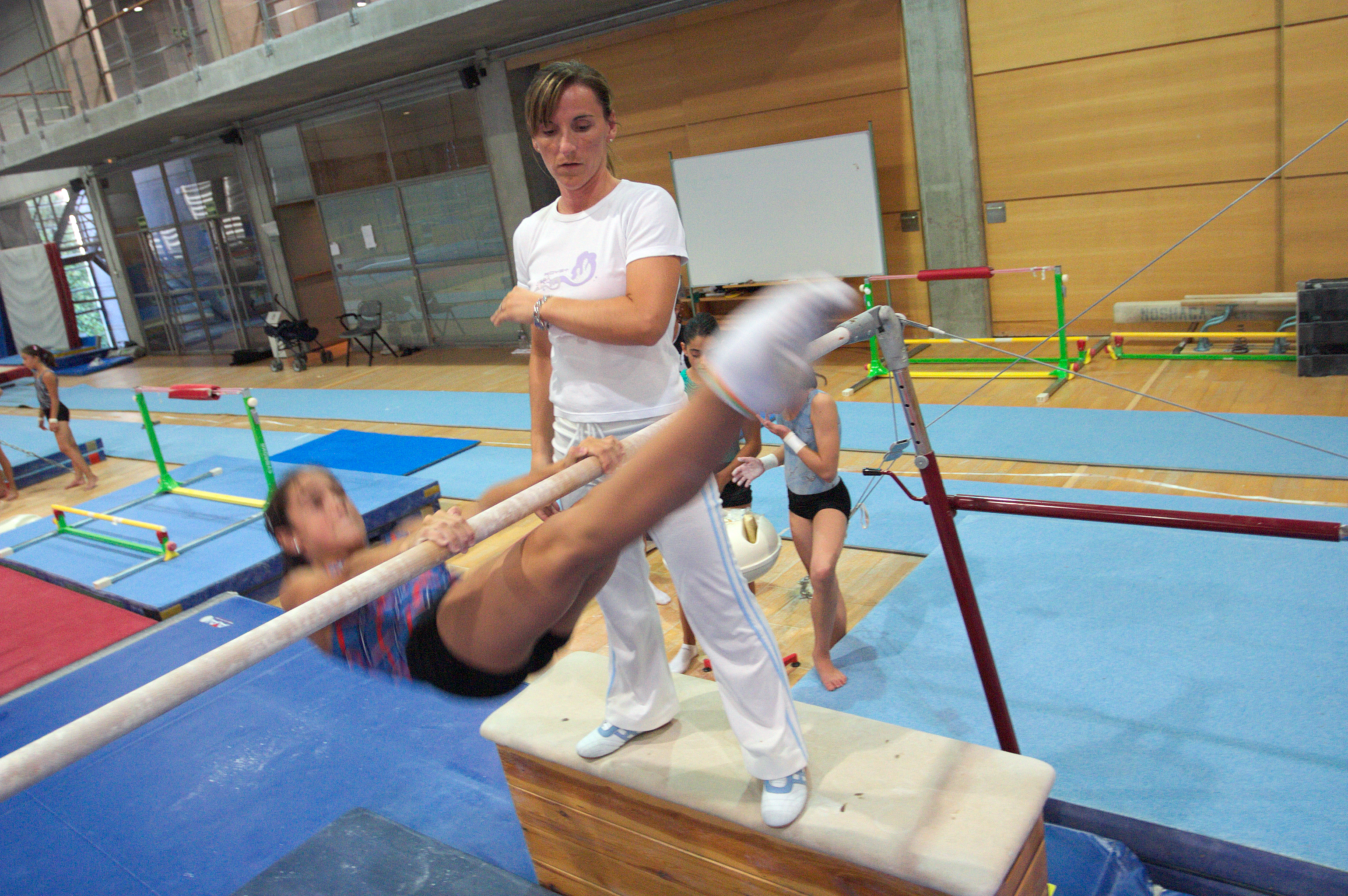 La exgimnasta y entrenadora Eva Rueda, con la gimnasta María González (procedente del Club Deportivo Gimnástico Hytasa de Sevilla) en el CAR de Madrid el 15 de septiembre de 2004.